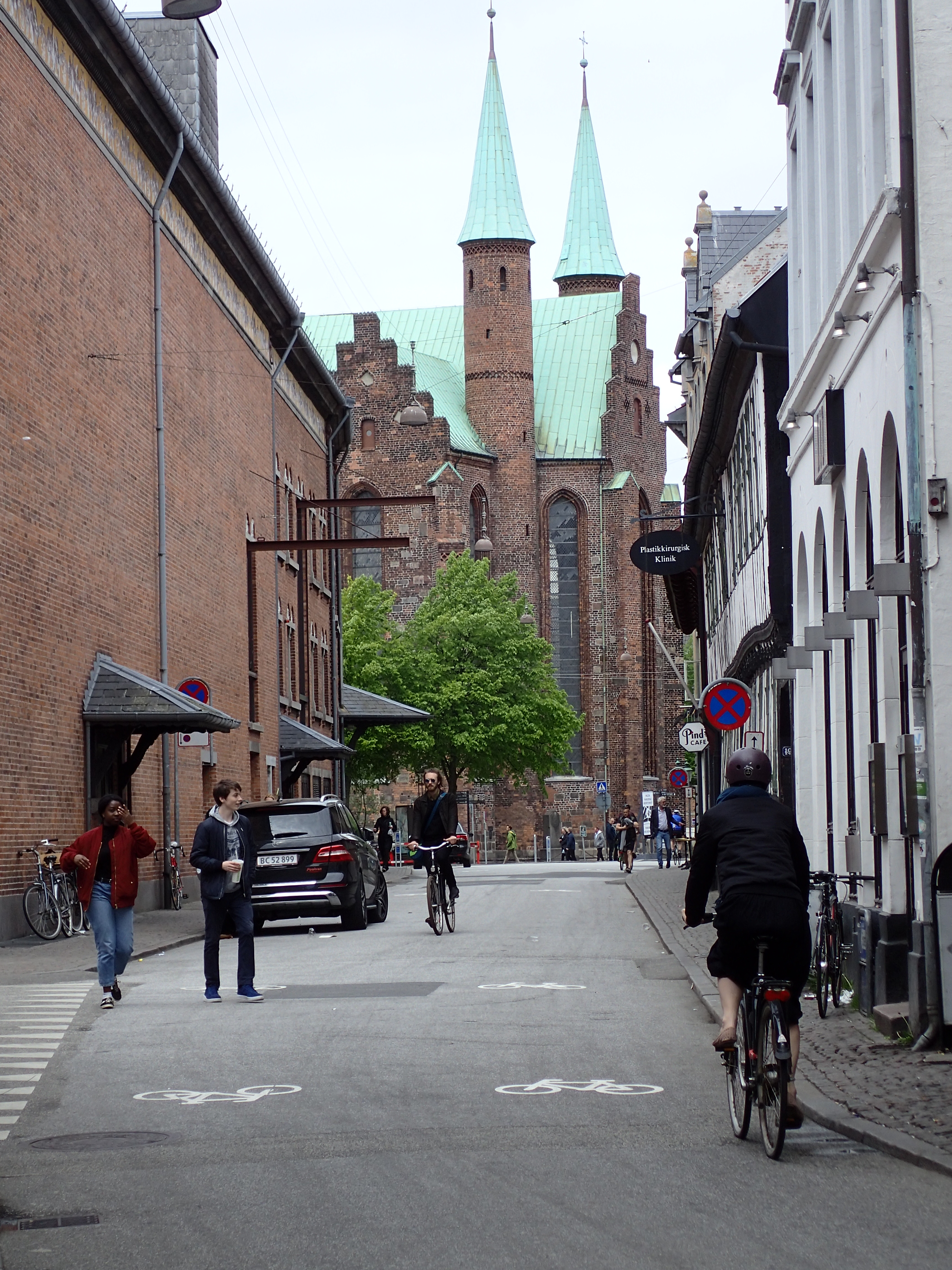 Skolegade, Aarhus.